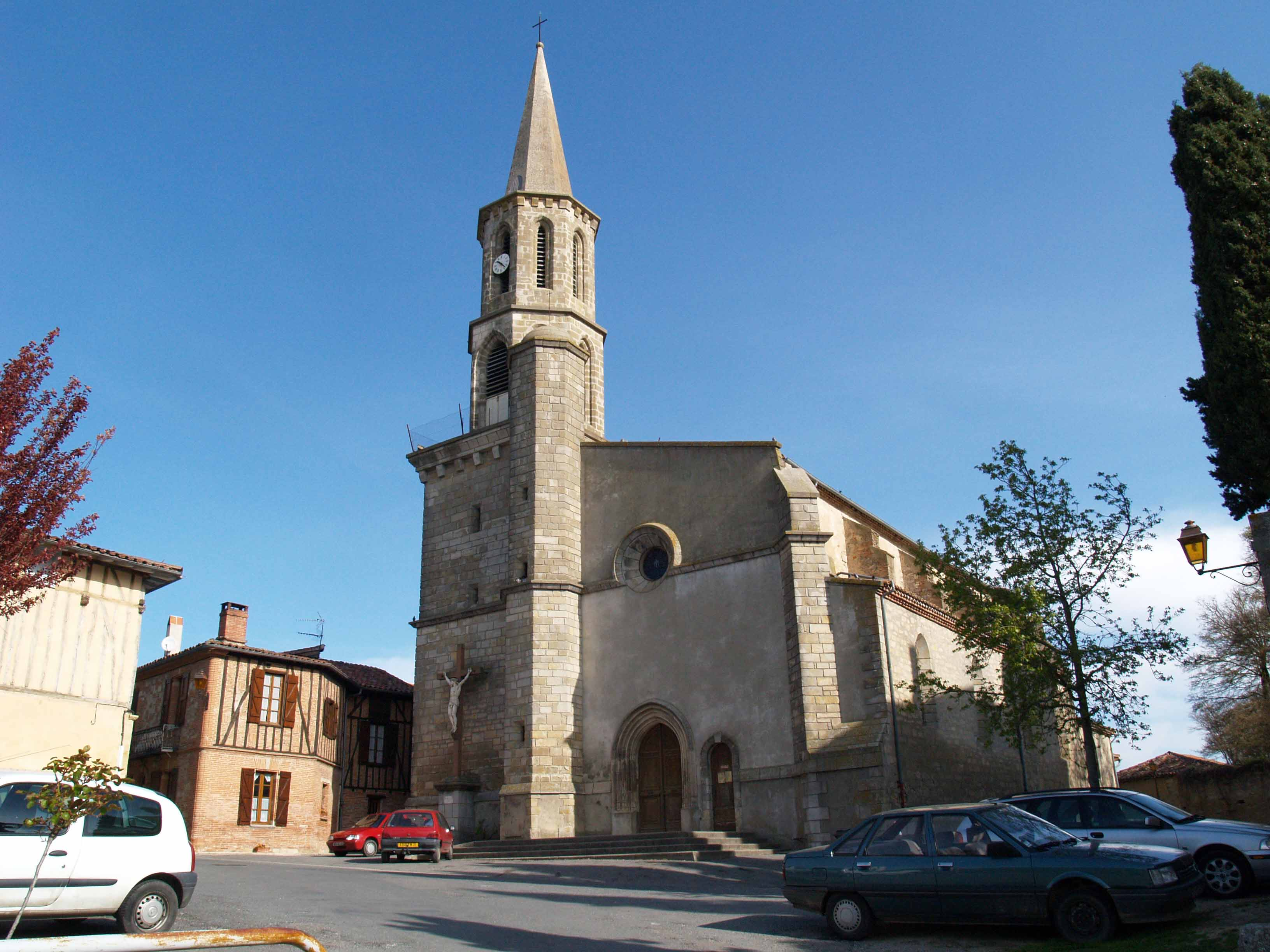 Loubens-Lauragais (Haute-Garonne, France) - L'église.